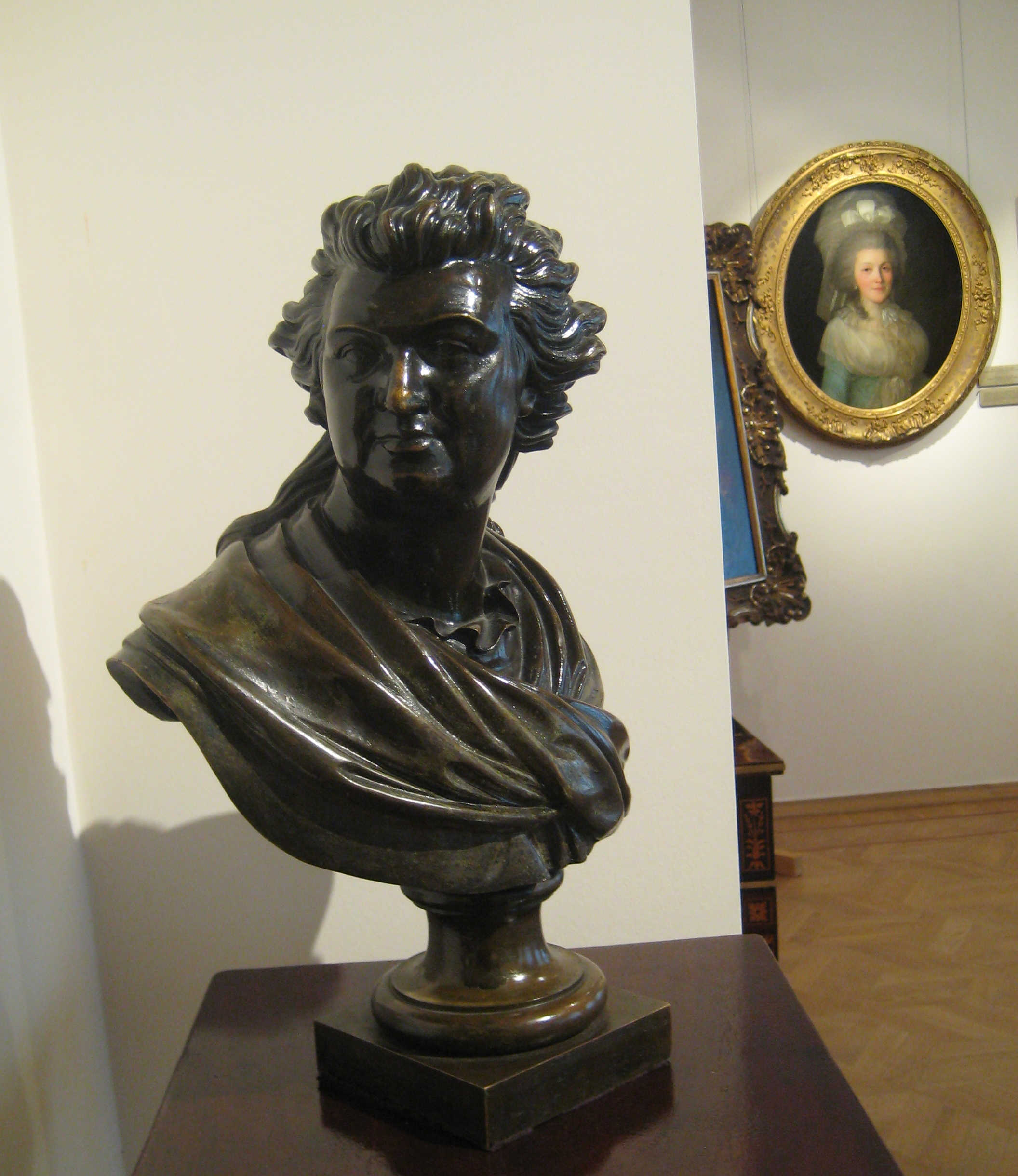 Бюст Потемкина. Музей Тропинина